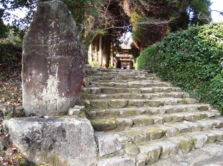 熊本県玉名市の廣福寺